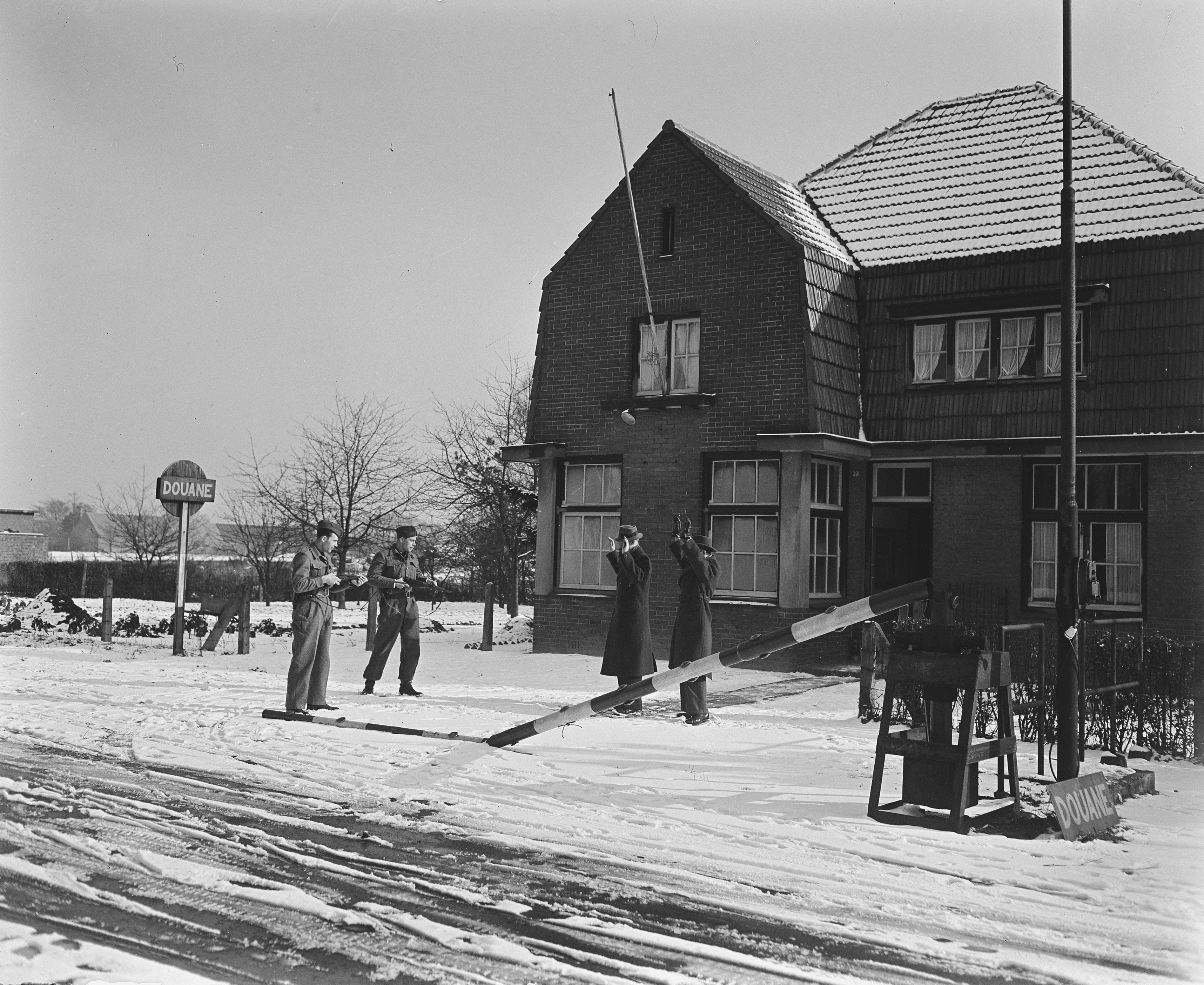 Collectie / Archief : Fotocollectie Anefo Reportage / Serie : [ onbekend ] Beschrijving : Grensincident Venlo; Reconstructie met Lemmens Datum : 20 februari 1948 Trefwoorden : RECONSTRUCTIES Fotograaf : Snikkers, […] / Anefo Auteursrechthebbende : Nationaal Archief Materiaalsoort : Glasnegatief Nummer archiefinventaris : bekijk toegang 2.24.01.09 Bestanddeelnummer : 902-6030